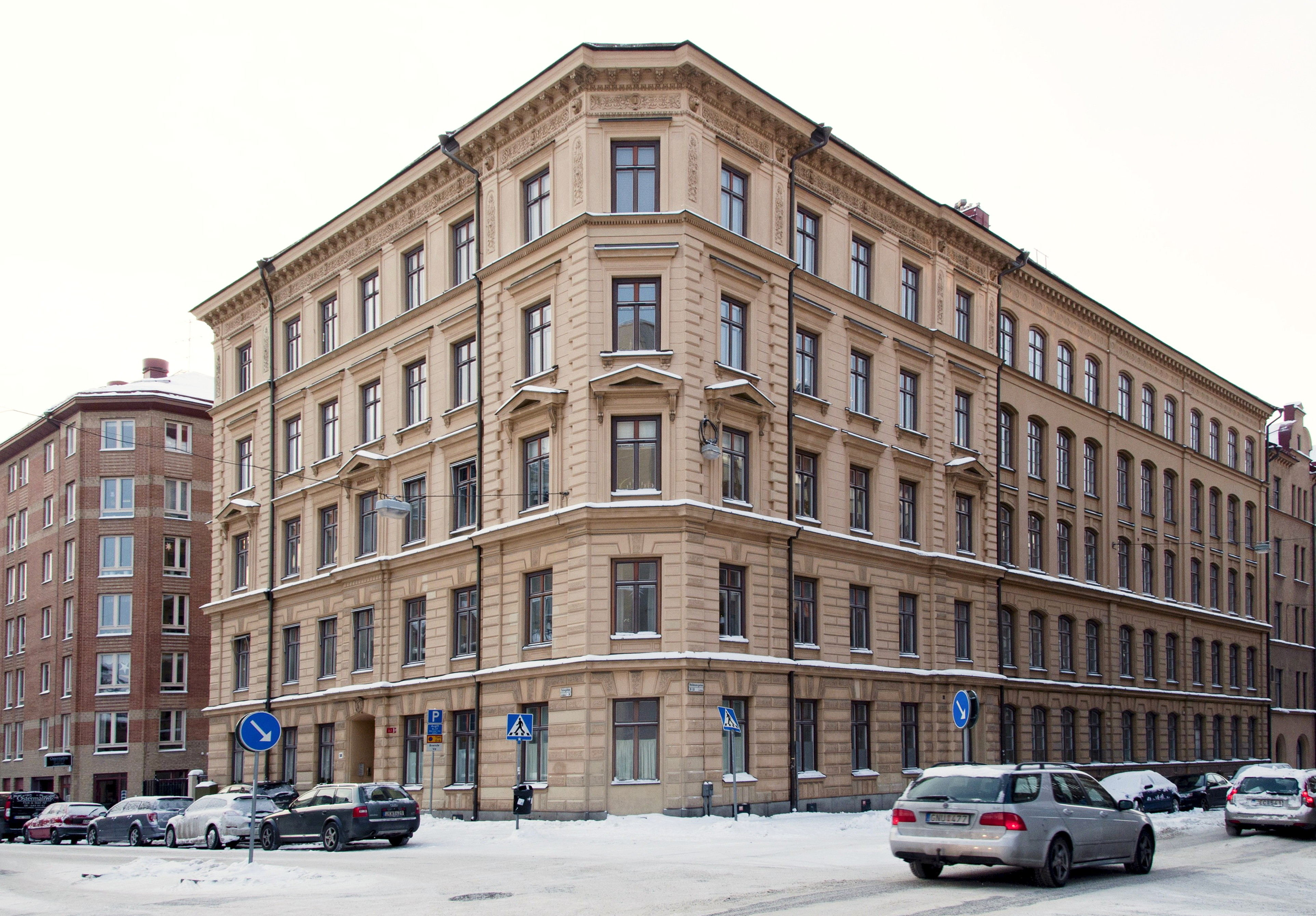 L M Ericssons verkstäder Tulegatan 5, Rådmansgatan 31 Byggnadsår 1884, arkitekt Gustav Sjöberg, byggherre L M Ericsson, byggmästare S Lindon. Tillbyggt 1890-91, arkitekt Wilhelm Klemming, byggherre L M Ericsson